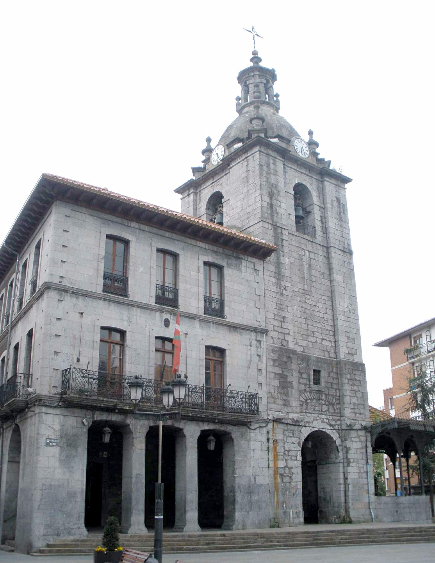 Llodio (Álava) - Iglesia de San Pedro de Lamuza